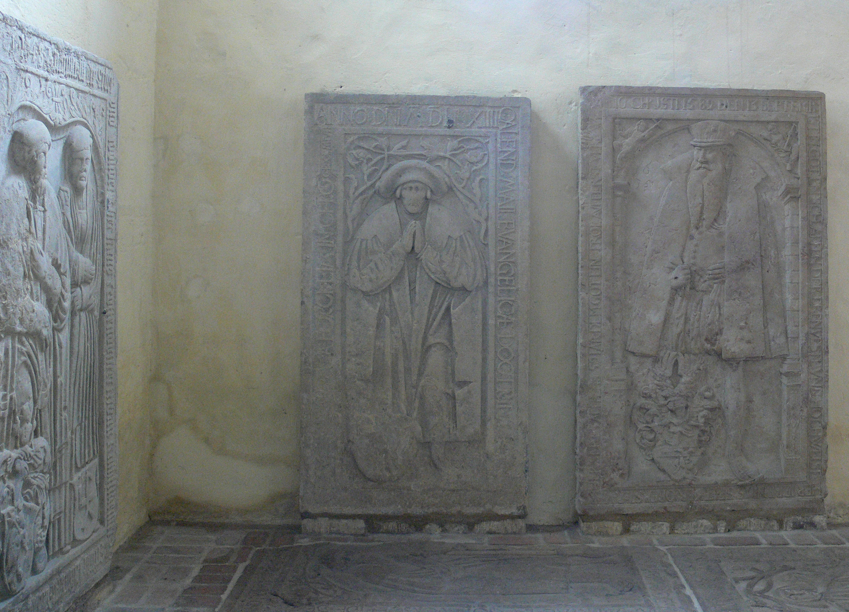 Predigerkirche Erfurt Epitaphe